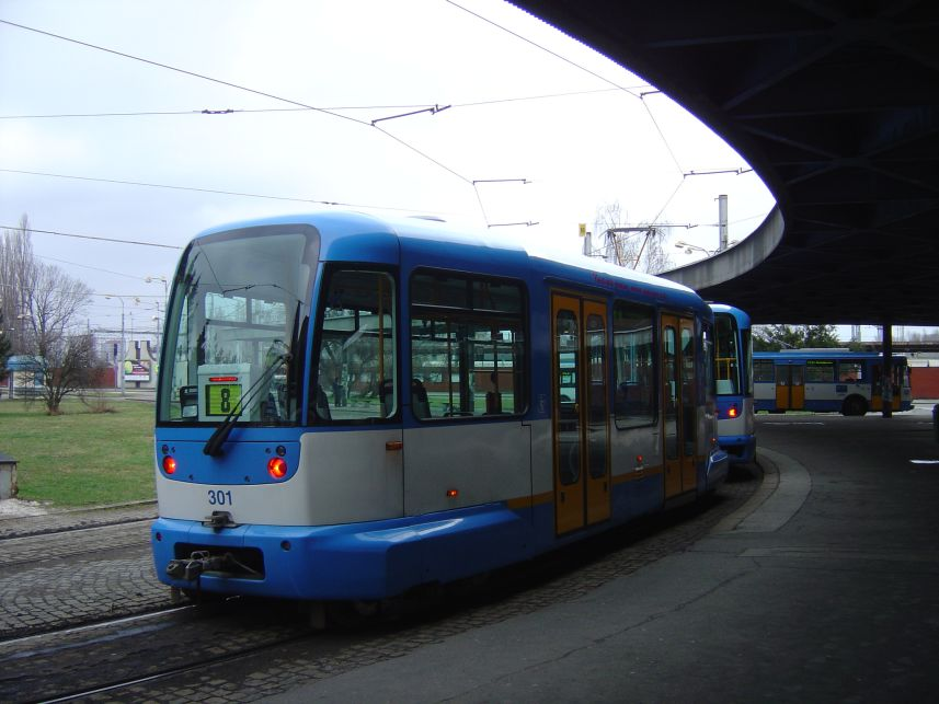 DPMO Ostrava